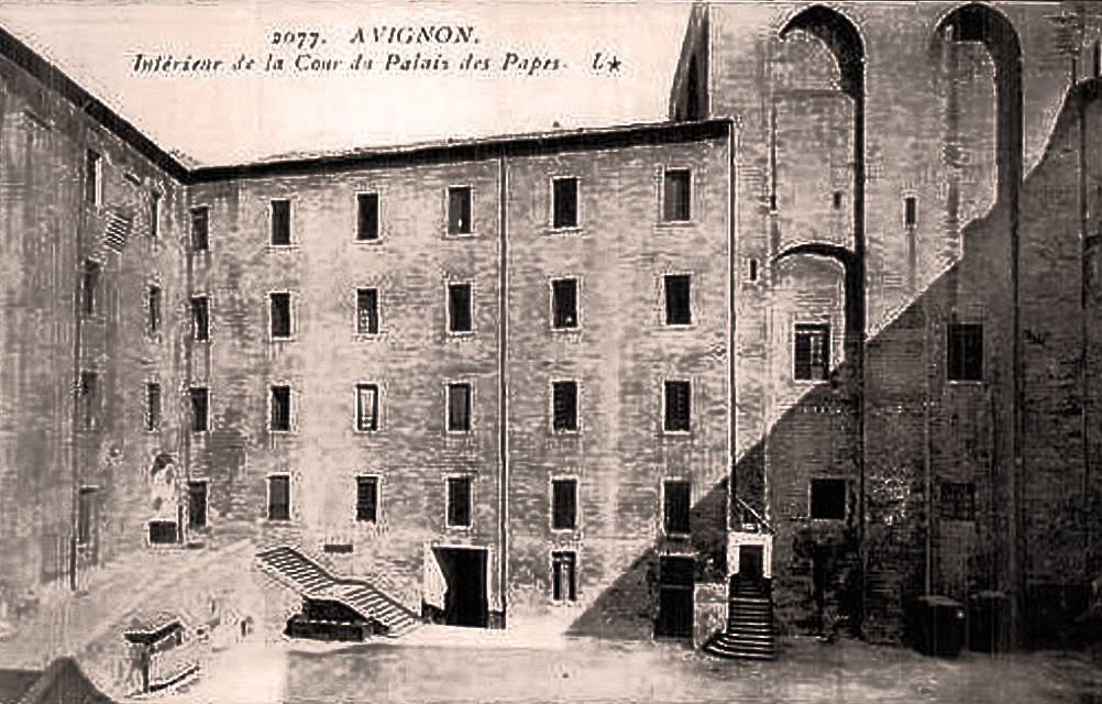 Avignon cour d'honneur du palais des papes alors transformé en caserne